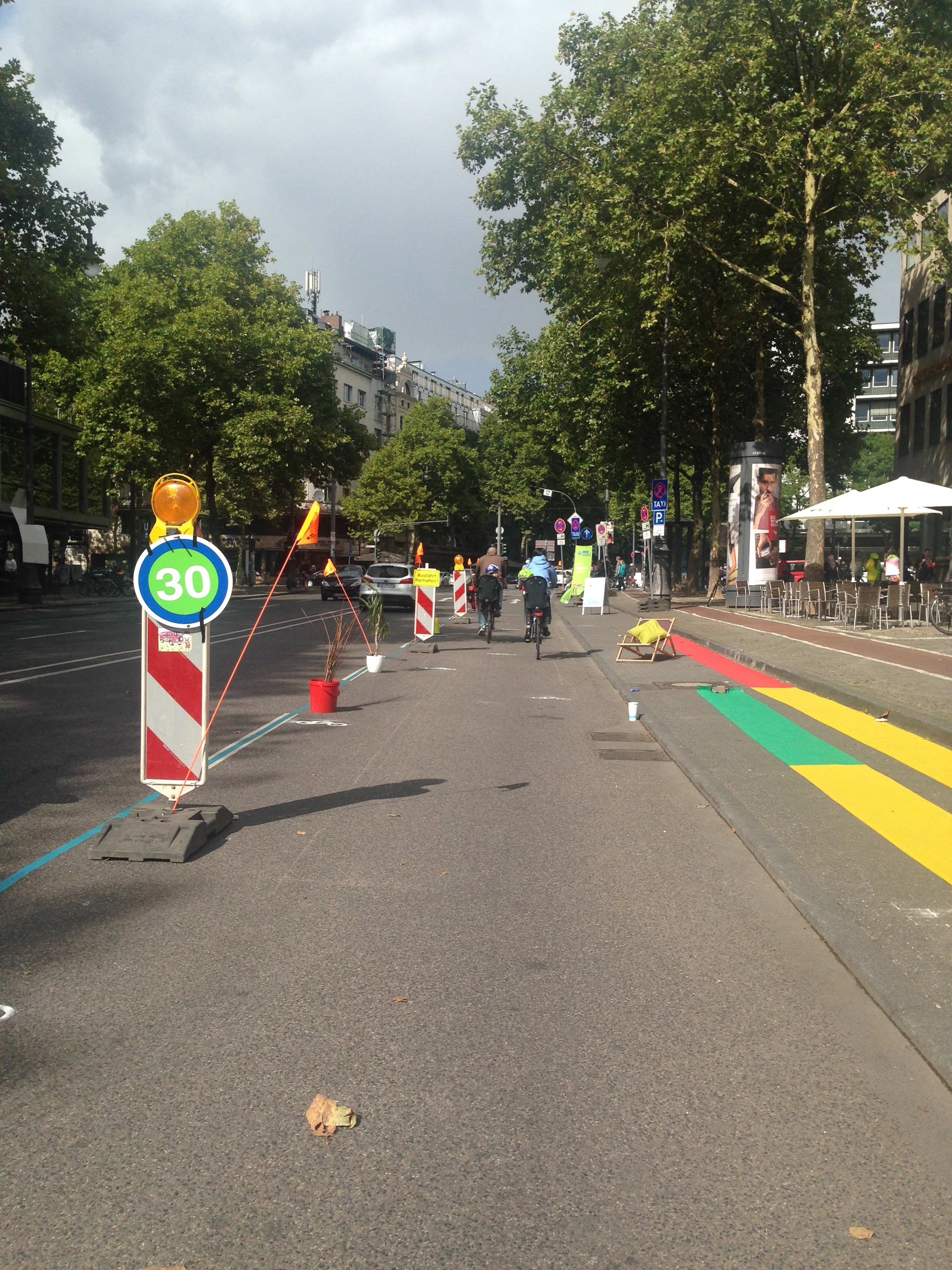 Die komplette rechte Spur den Radfahrenden bei Tempo 30 lautet eine Forderung der Initiative #RingFrei. Am 16. September 2017 im Rahmen der Aktion „Wir machen den #RingFrei“ wurde demonstriert, wie sich die Unterstützer sich das vorstellen.